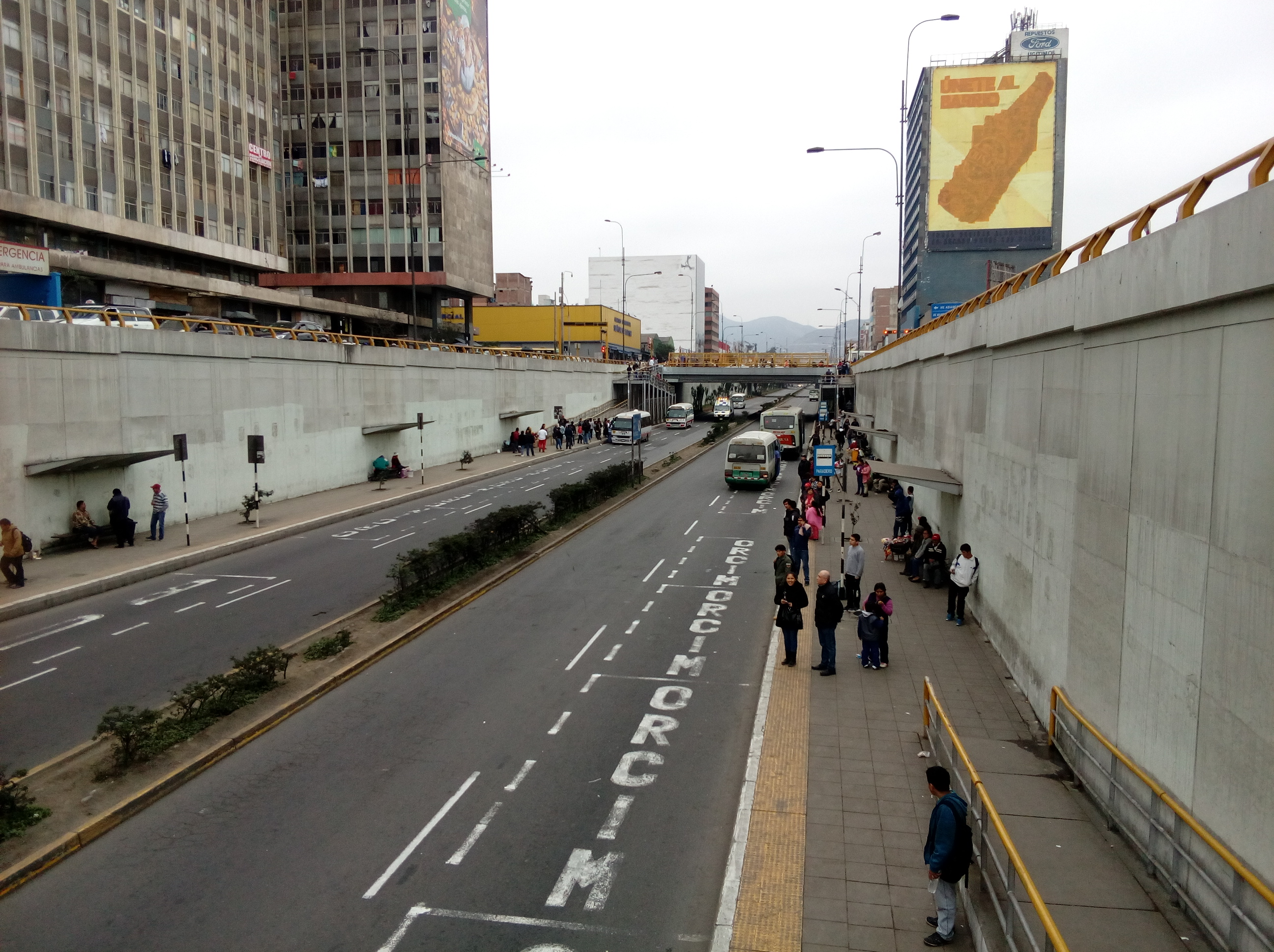 La Vía Expresa Grau en Junio de 2018. Foto tomada desde la bajada del puente de la Av. Iquitos.